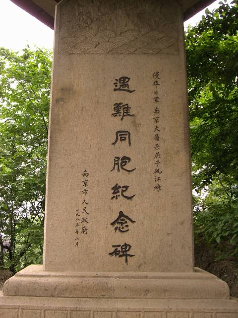 燕子磯 南京大虐殺紀念碑 2004年5月15日撮影 撮影者：権作 参照：